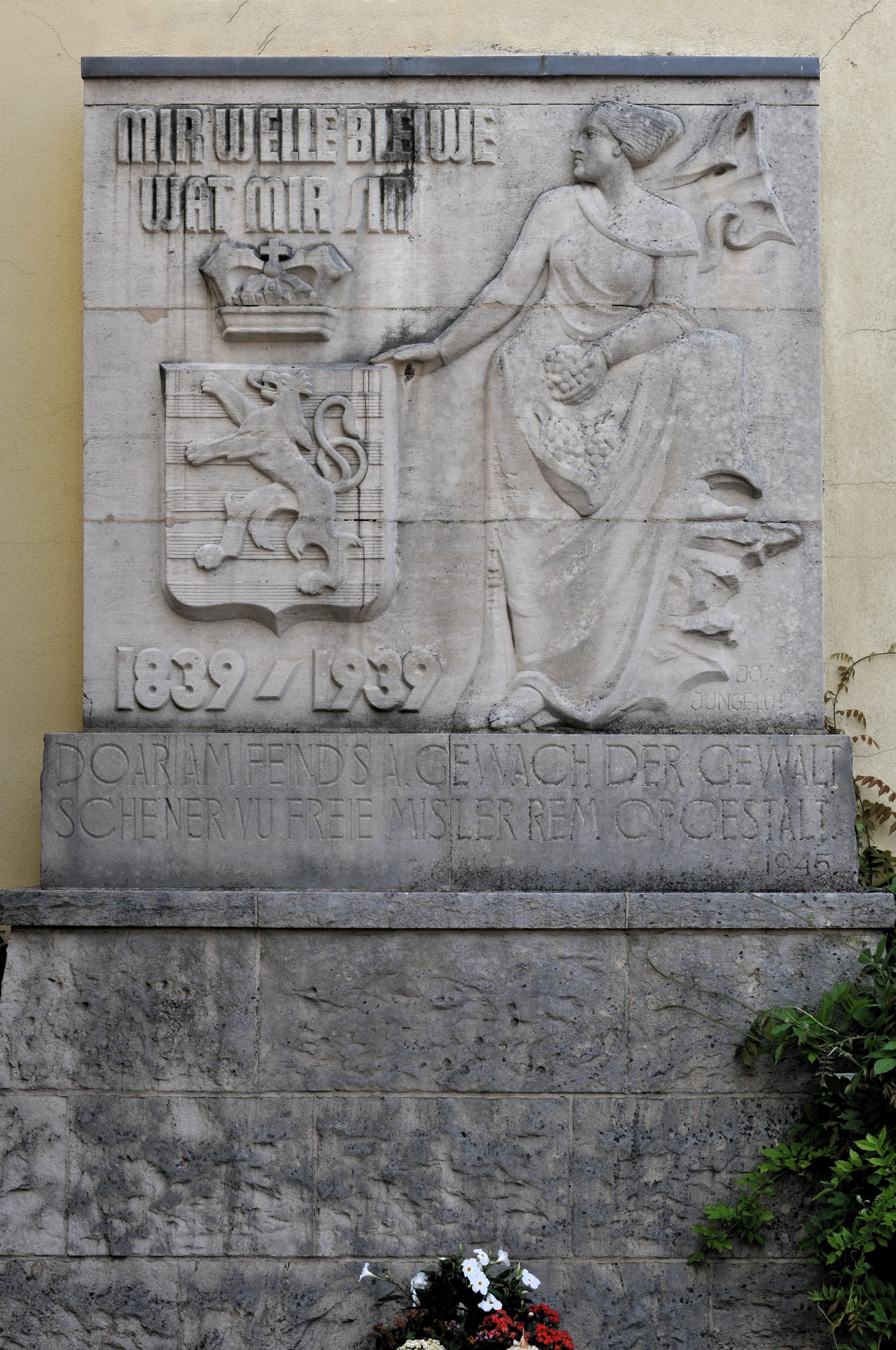 D'Onofhängegkeetsmonument, entworf vum Josy Jungblut, gouf 1939 bei der Schwéidsbenger Kierch opgestallt. Während der preisescher Occupatioun (1940-1944) gouf et ewechgeholl an anzwouch verstoppt. 1945 gouf d'Denkmal nei opgeriicht mat dem Zousaz: Doar am Feind's A. Gewach der Gewalt Schener vu freie Misler rem opgestallt